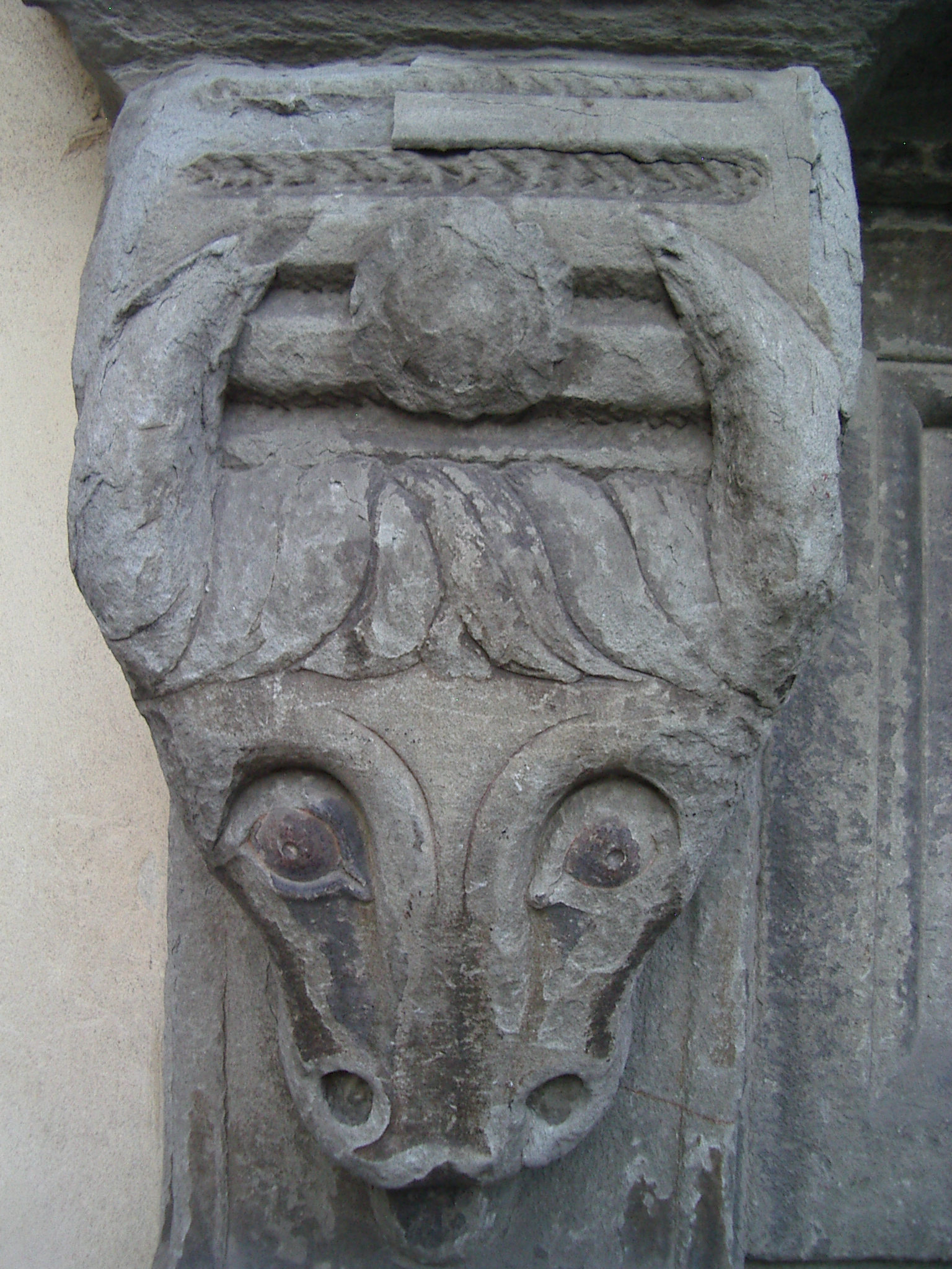 Blason de la famille Bufalini -Città di Castello- Ombrie-Italie